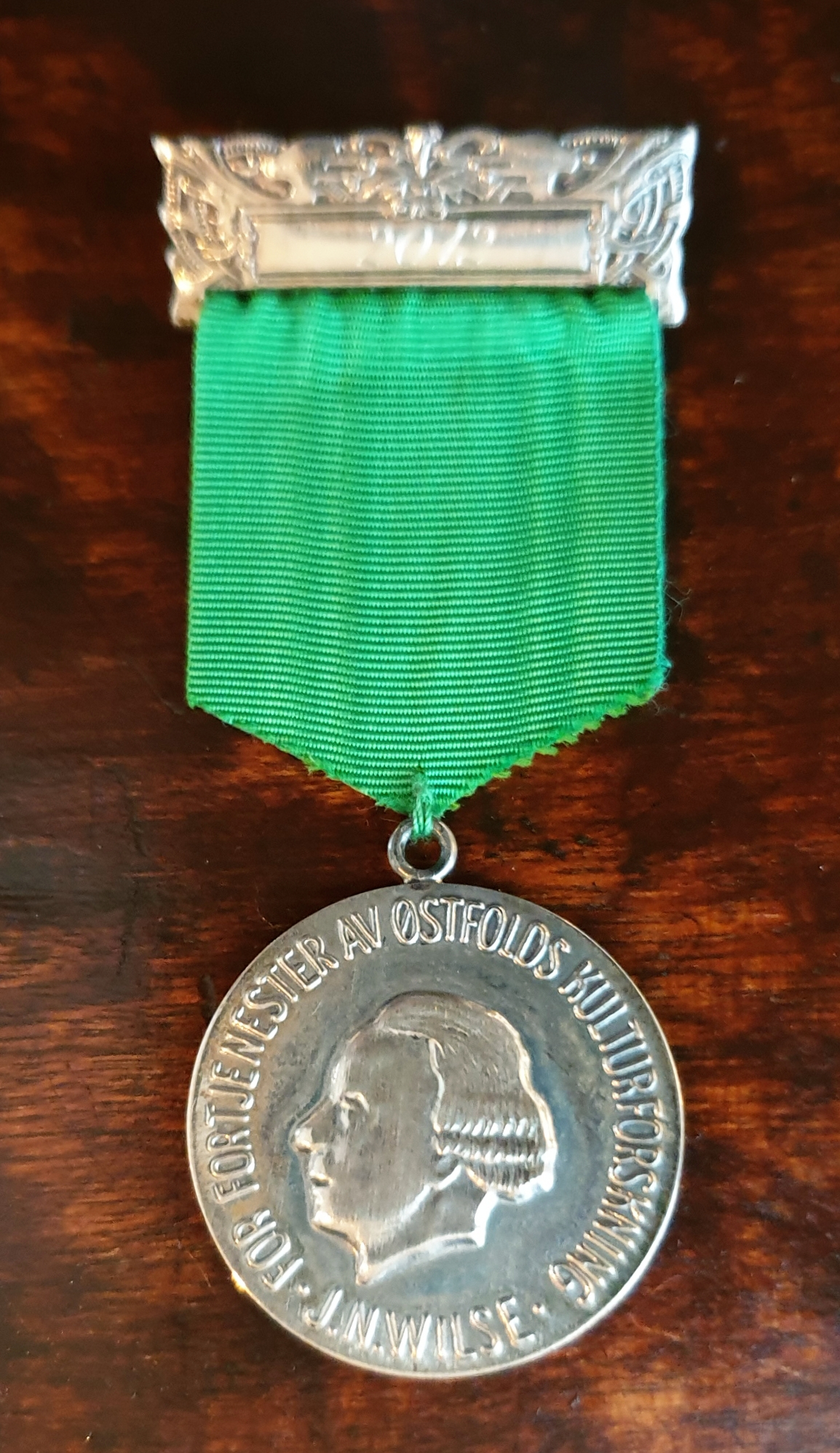 Wilsemedaljen i grønt bånd.